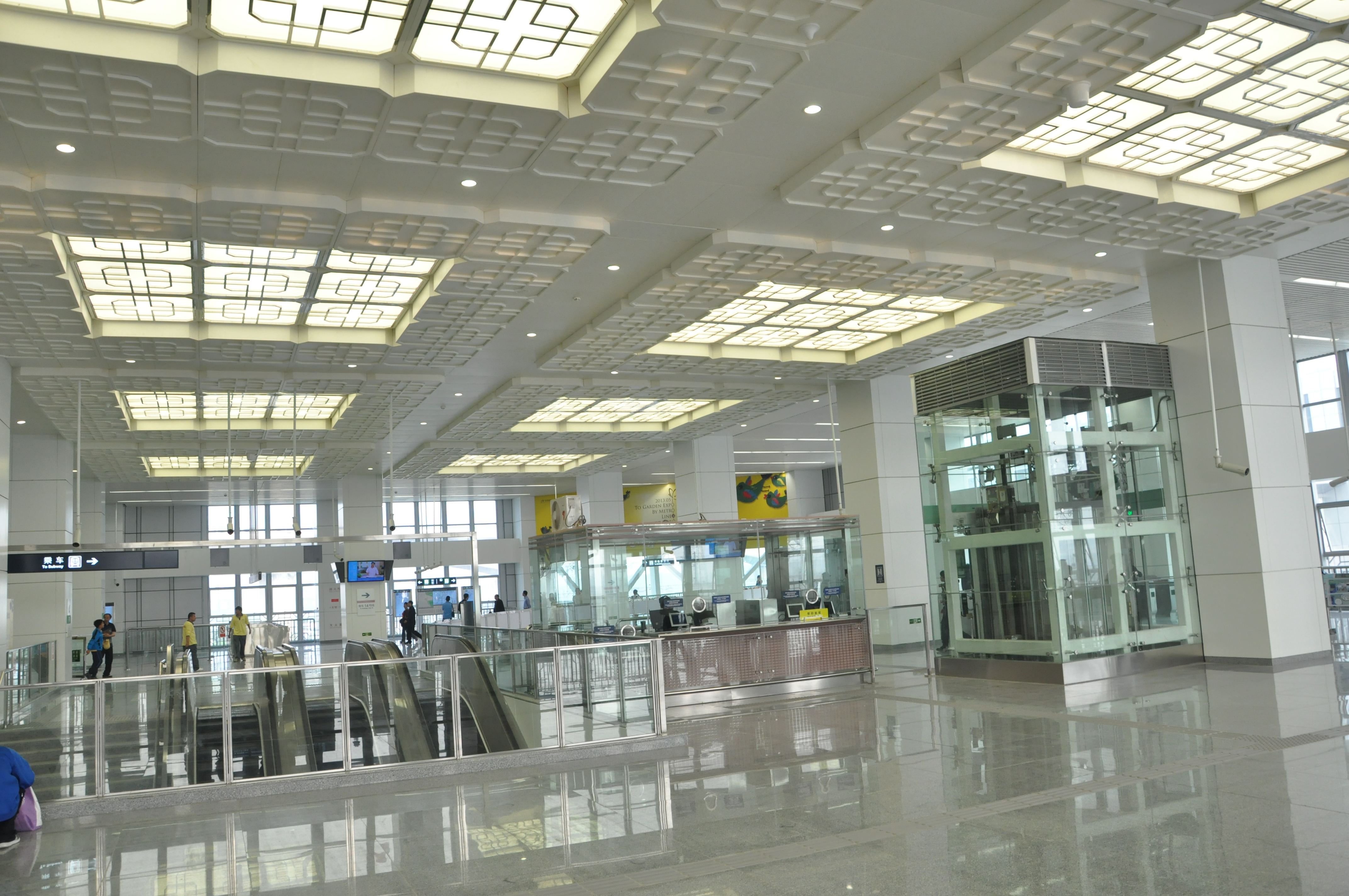 北京地铁14号线园博园站北侧外挂站厅二层。